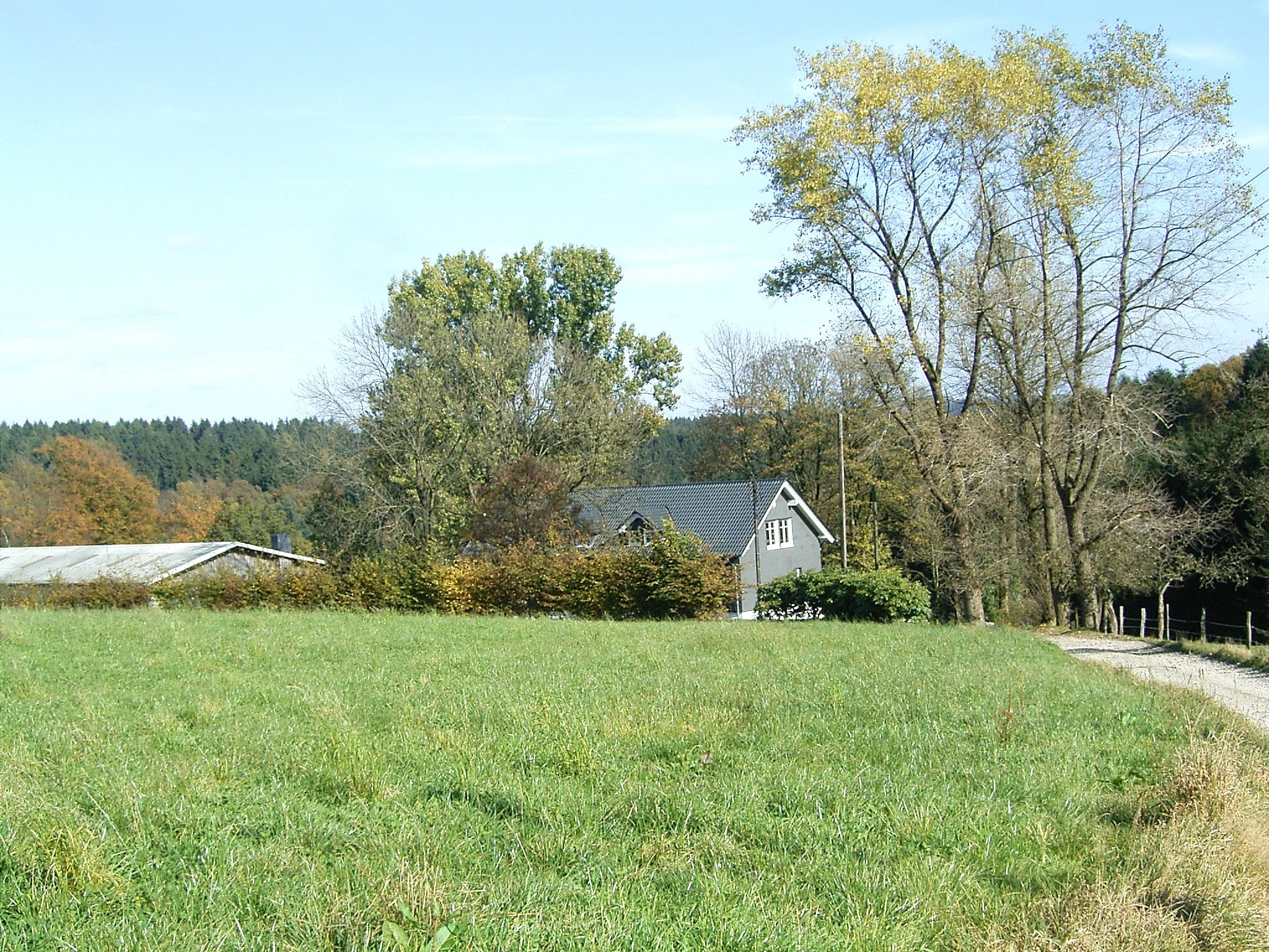 Radevormwald